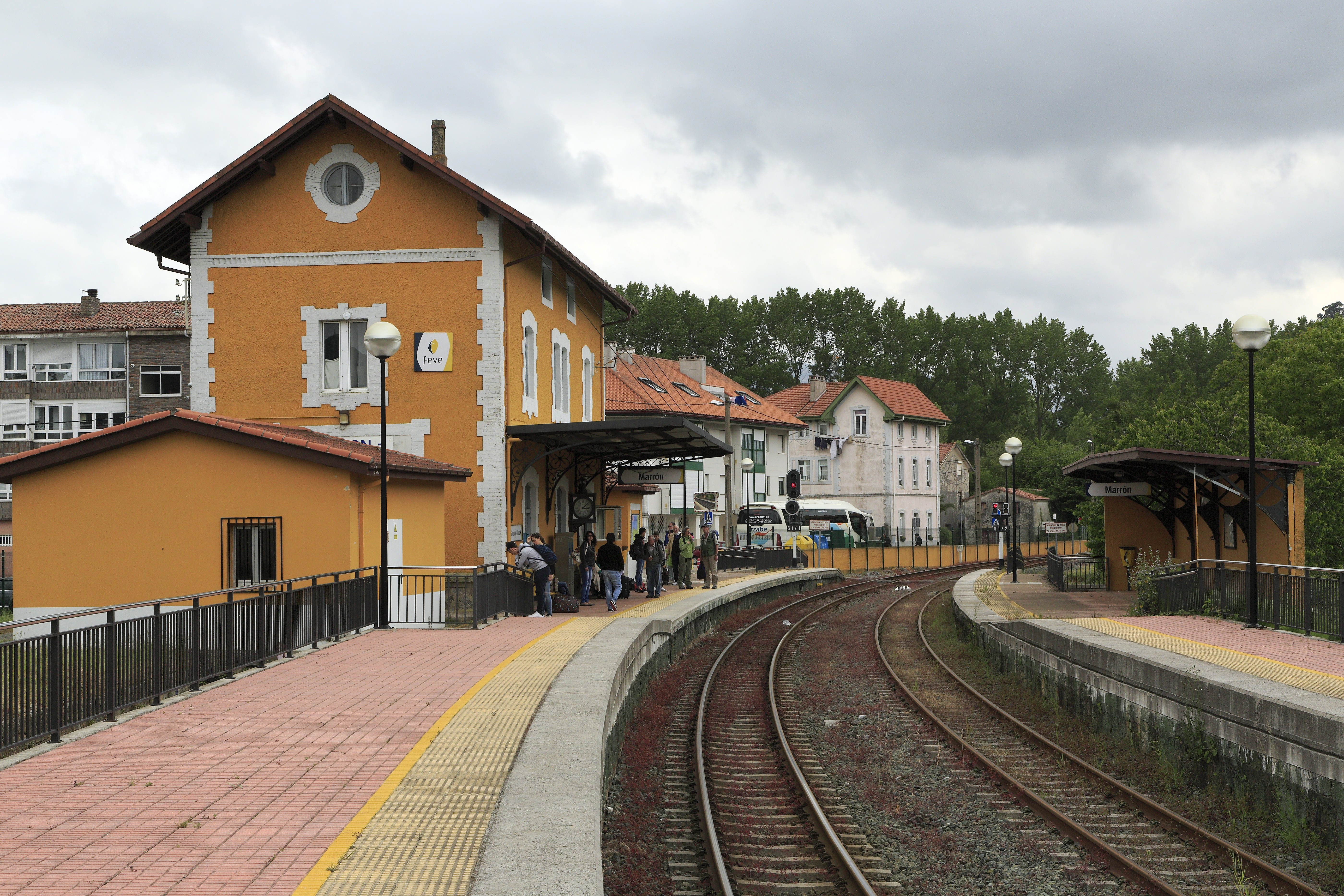 Die Reisenden wurden vom Schienenersatzverkehrsbus abgeladen, ab hier verkehren wieder Züge. Wegen der unterschiedlichen Einstiegsverhältnisse der Wagen gibt es Bahnsteigabschnitte mit verschiedenen Höhen.